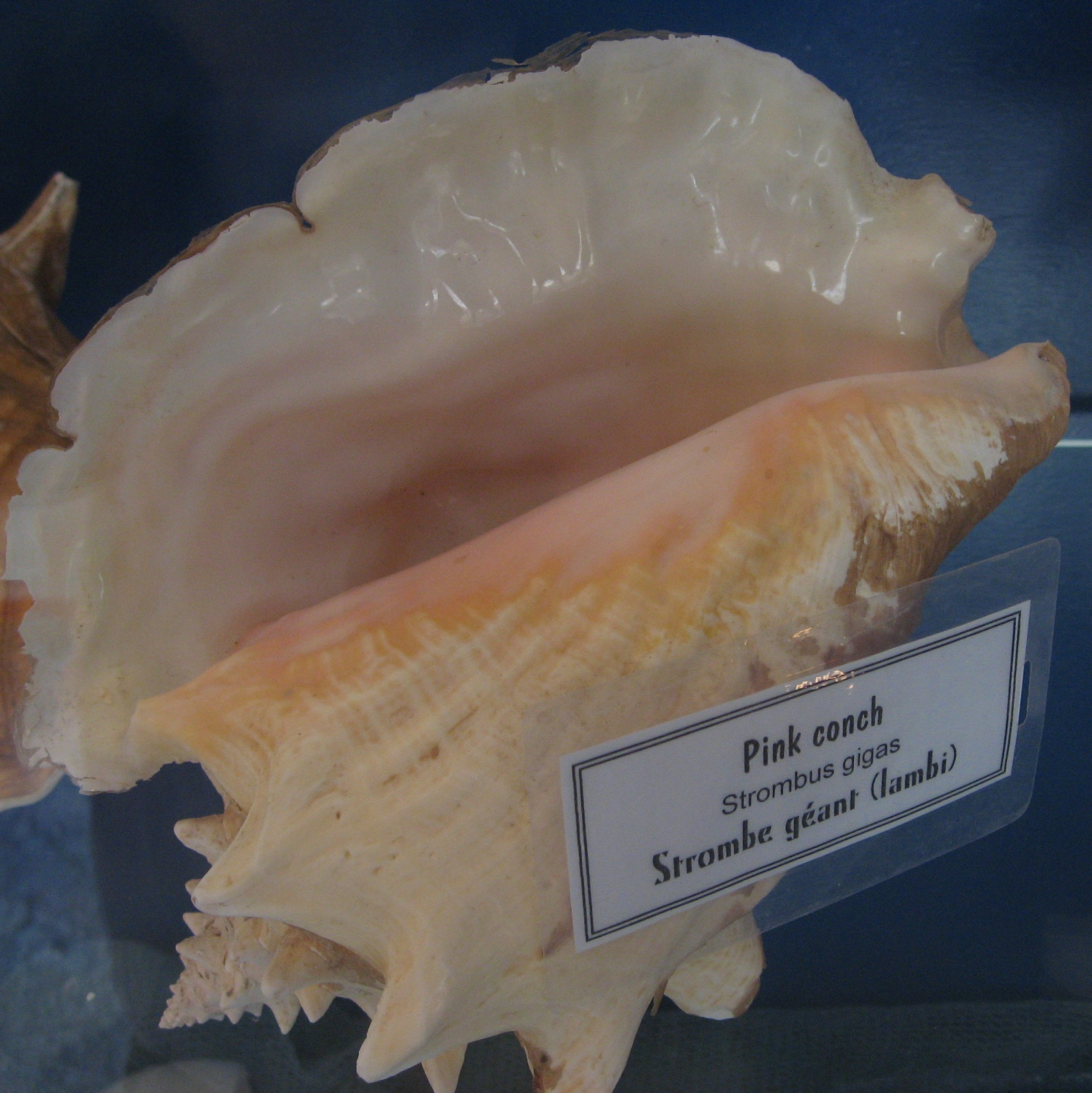 Eustrombus gigas au Fort Napoléon en Guadeloupe, îlet Terre de haut-de-haut l'archipel Saintes